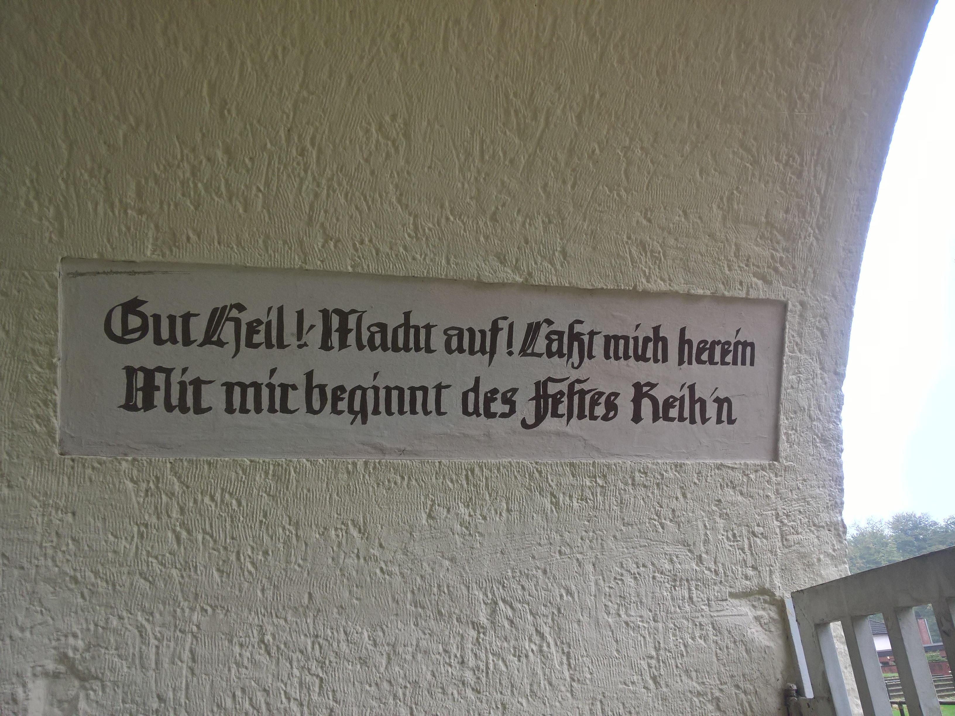 Inschrift im Eingangstor zum Sportpark Katzenbusch in Herten